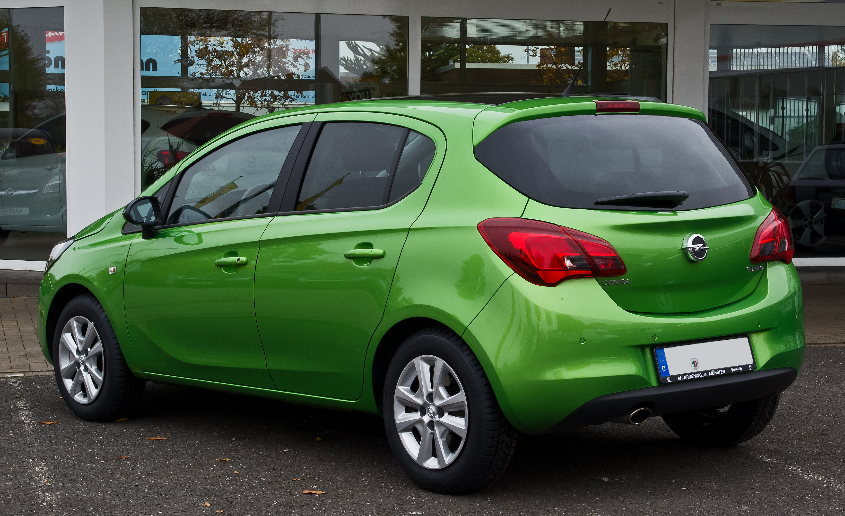 Opel Corsa 1.4 Turbo ecoFLEX Color Edition (E)